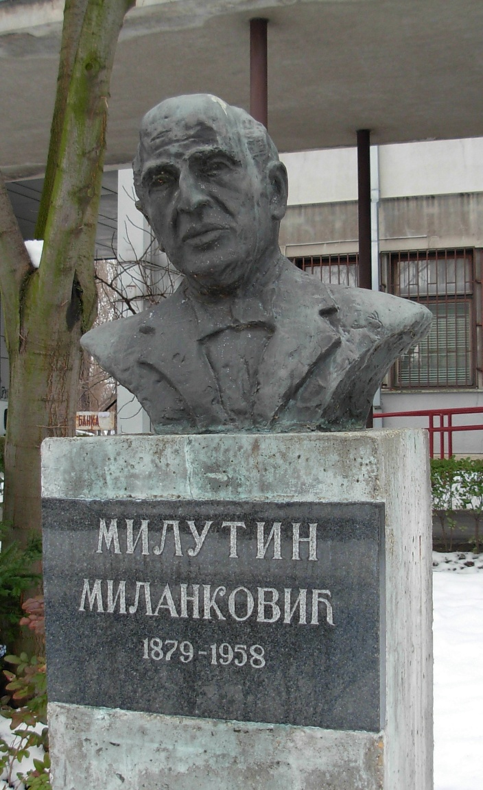 Bista Milutina Milankovića (1879-1958) ispred Prirodno-matematičkog fakulteta u Novom Sadu.